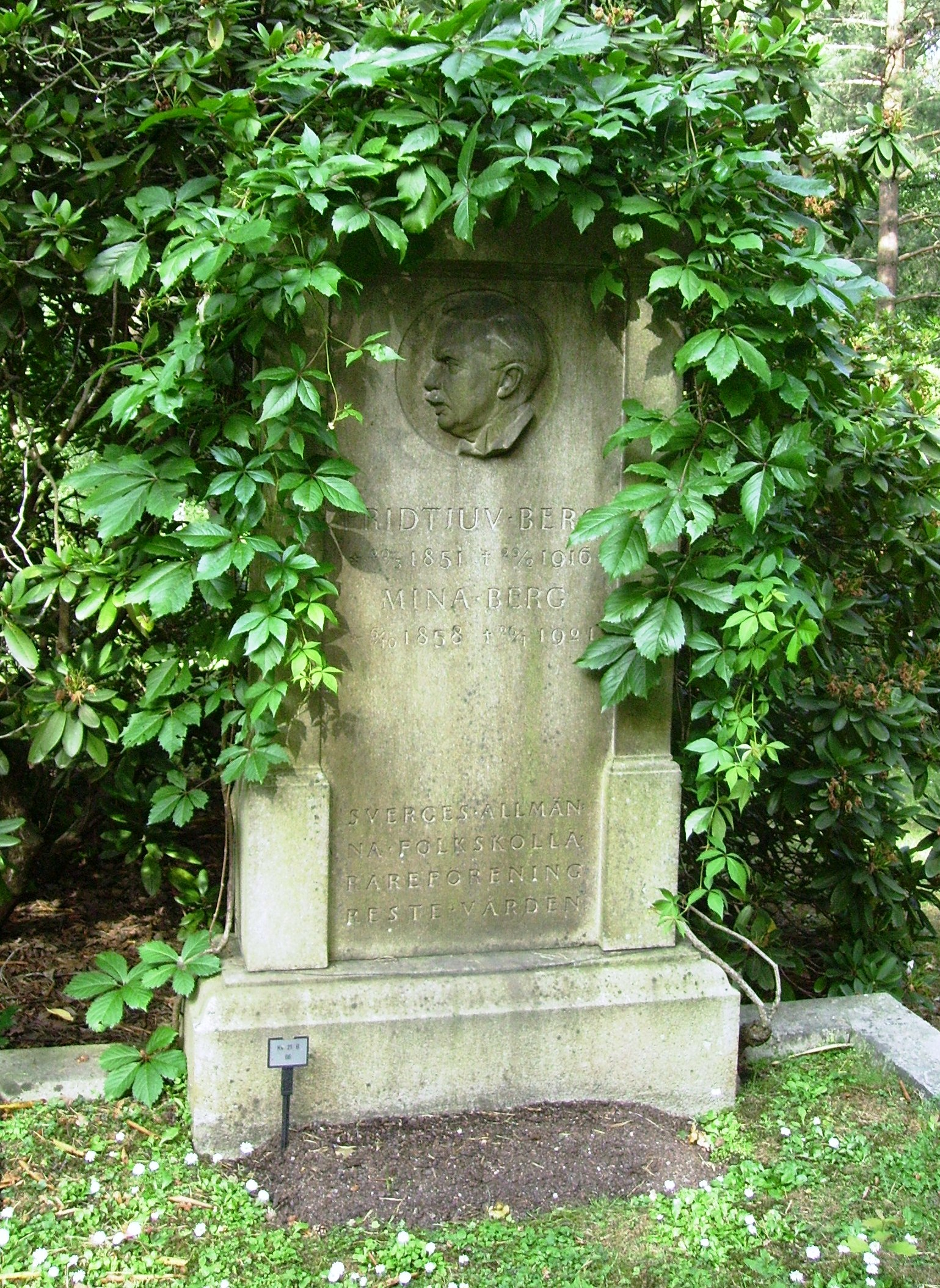 Picture of Fridtjuv Berg's grave at Norra begravningsplatsen in Solna. Work by Christian Eriksson 1918